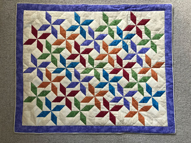 Dette smukke håndsyet tæppe er et klassisk tæppe med mange ens figure. Her er det farven som giver det flotte spil i tæppet. Dette tæppe er håndsyet over papskabeloner. Disse skabeloner pilles ud inden monteringen.